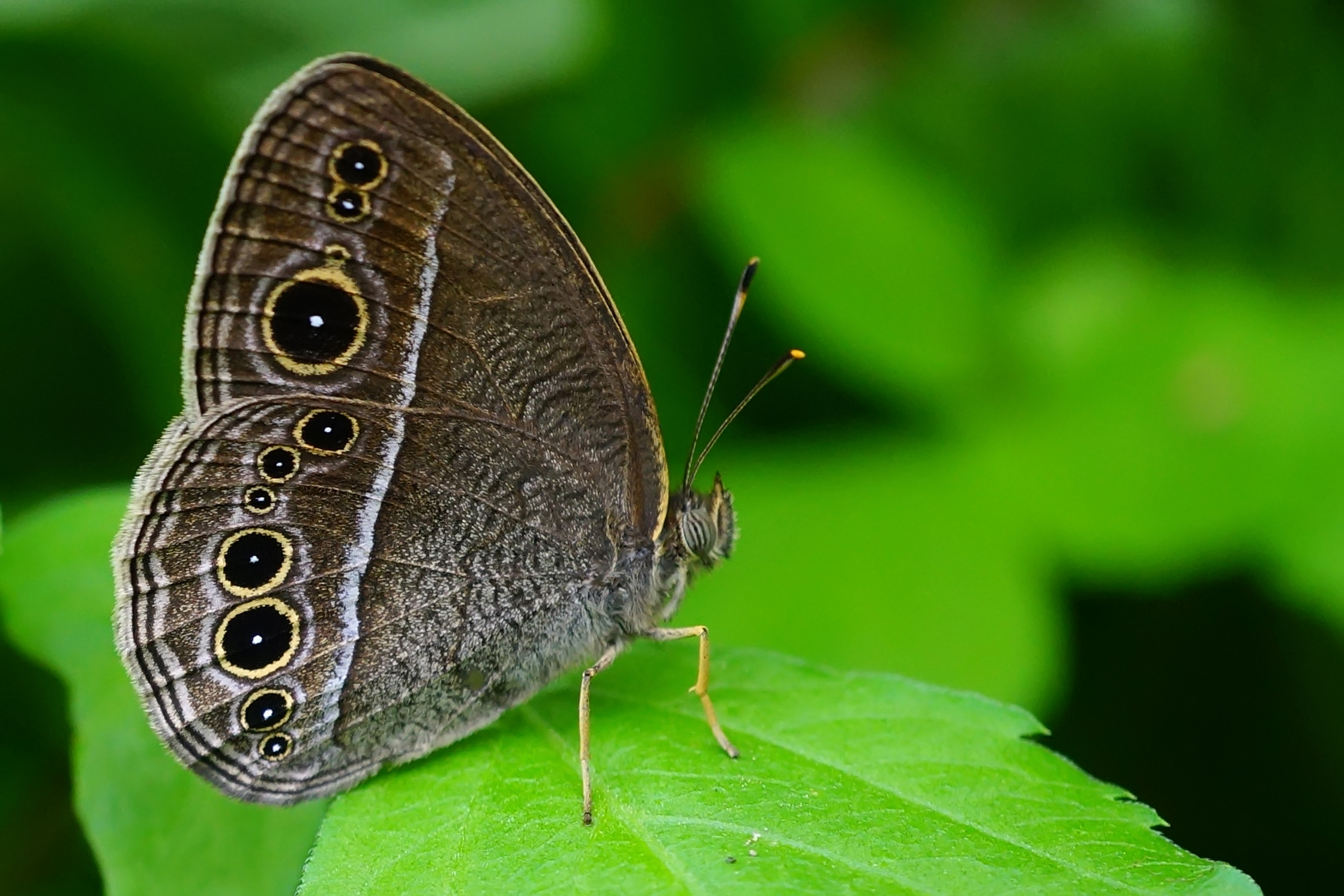 中文（台灣）: 淺色眉眼蝶 Mycalesis sangaica mara